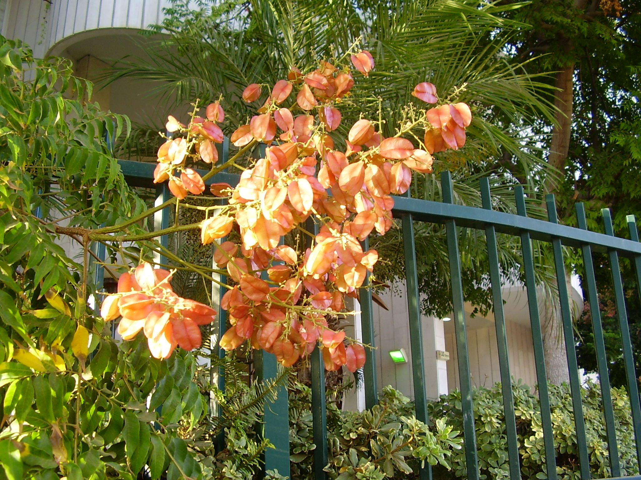 koelreuteria bipinnata (fruits), ramat-gan, israel